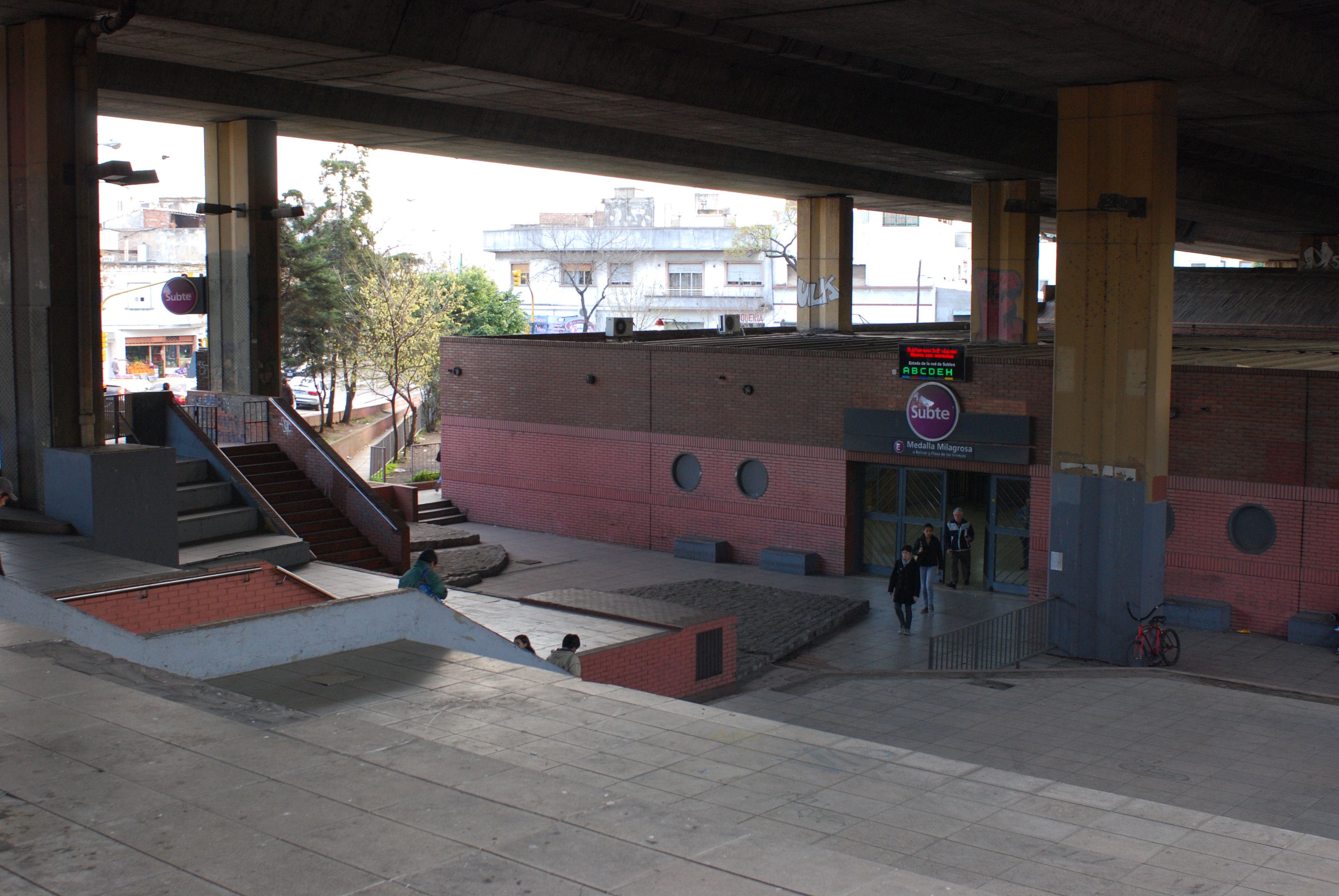 Entrada a la estación de subte Medalla Milagrosa de la línea E, Buenos Aires